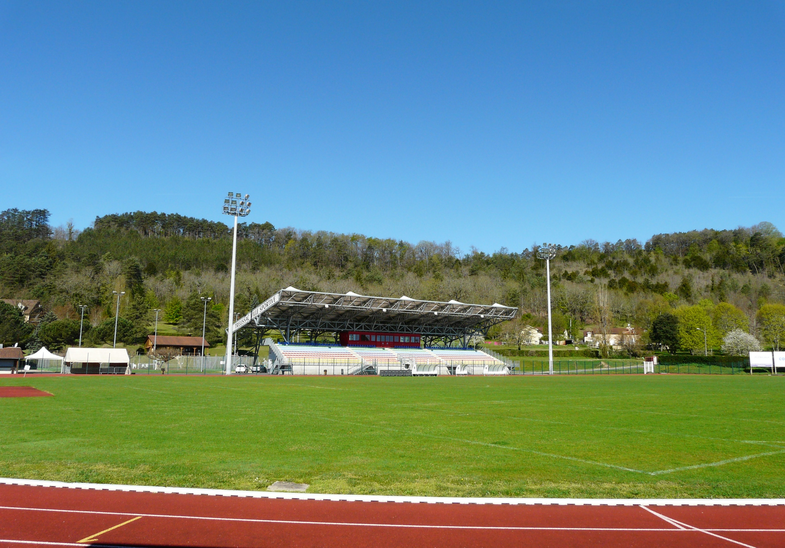 Le stade Firmin-Daudou, Trélissac, Dordogne, France.